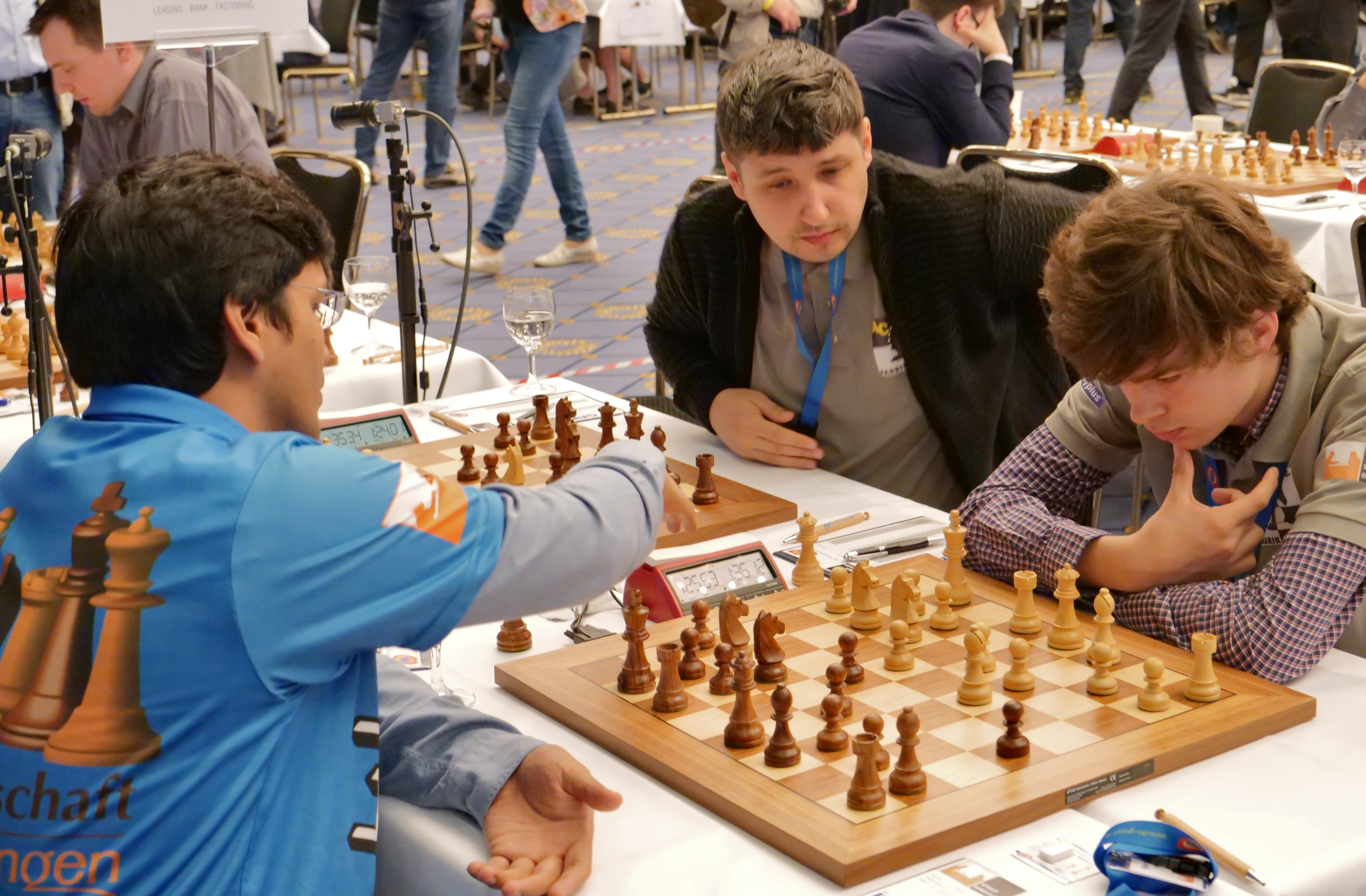 Van Foreest, Lupulescu und Harikrishna - Bundesliga-Endrunde 30-4-2018